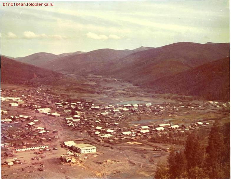 Посёлок Ыныкчан, 1990 год.